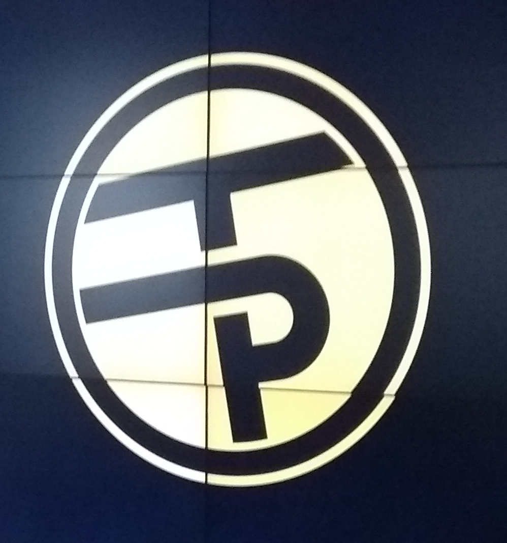 logo Todopoderosos